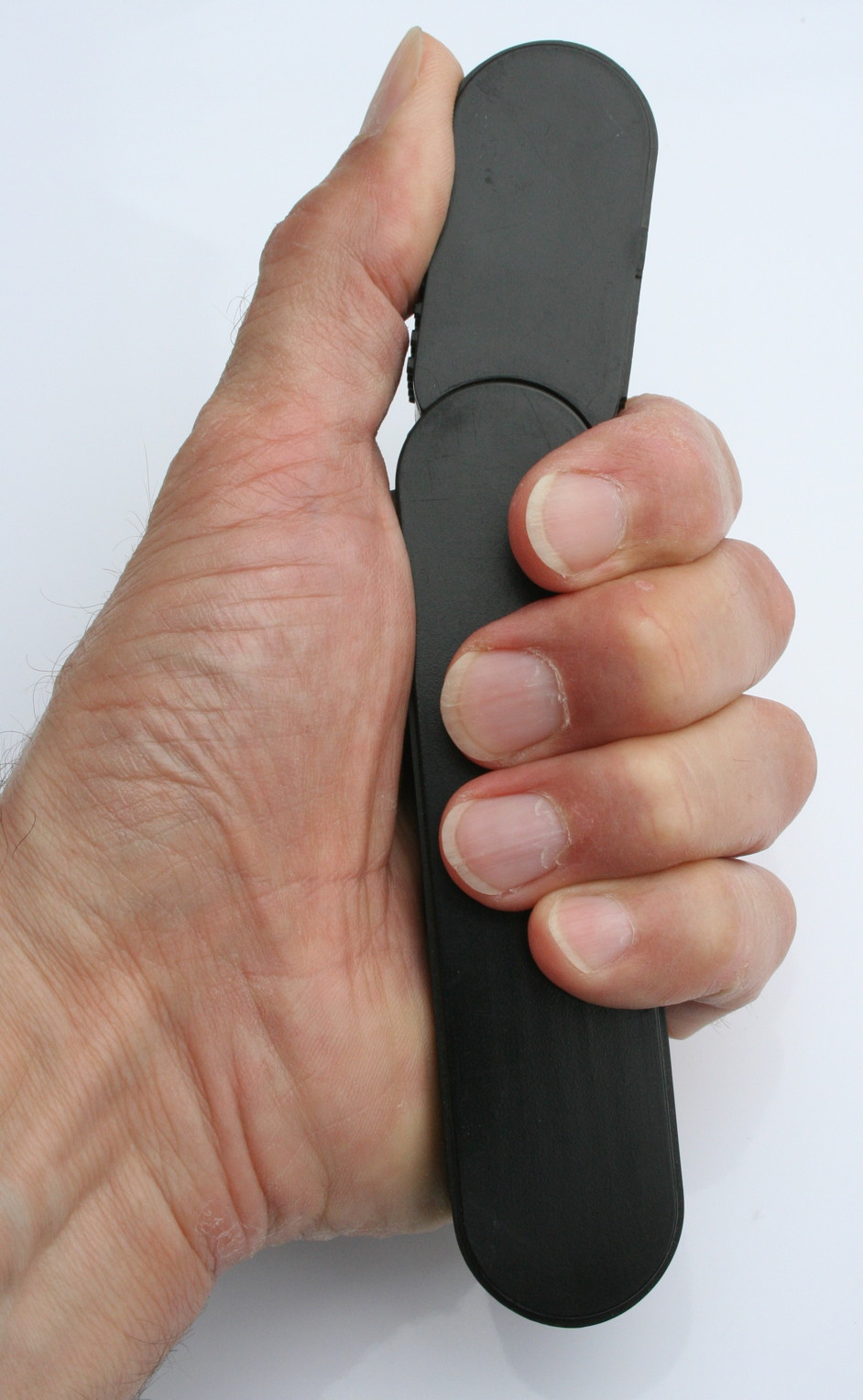 Piezostab zum Entladen von LPs